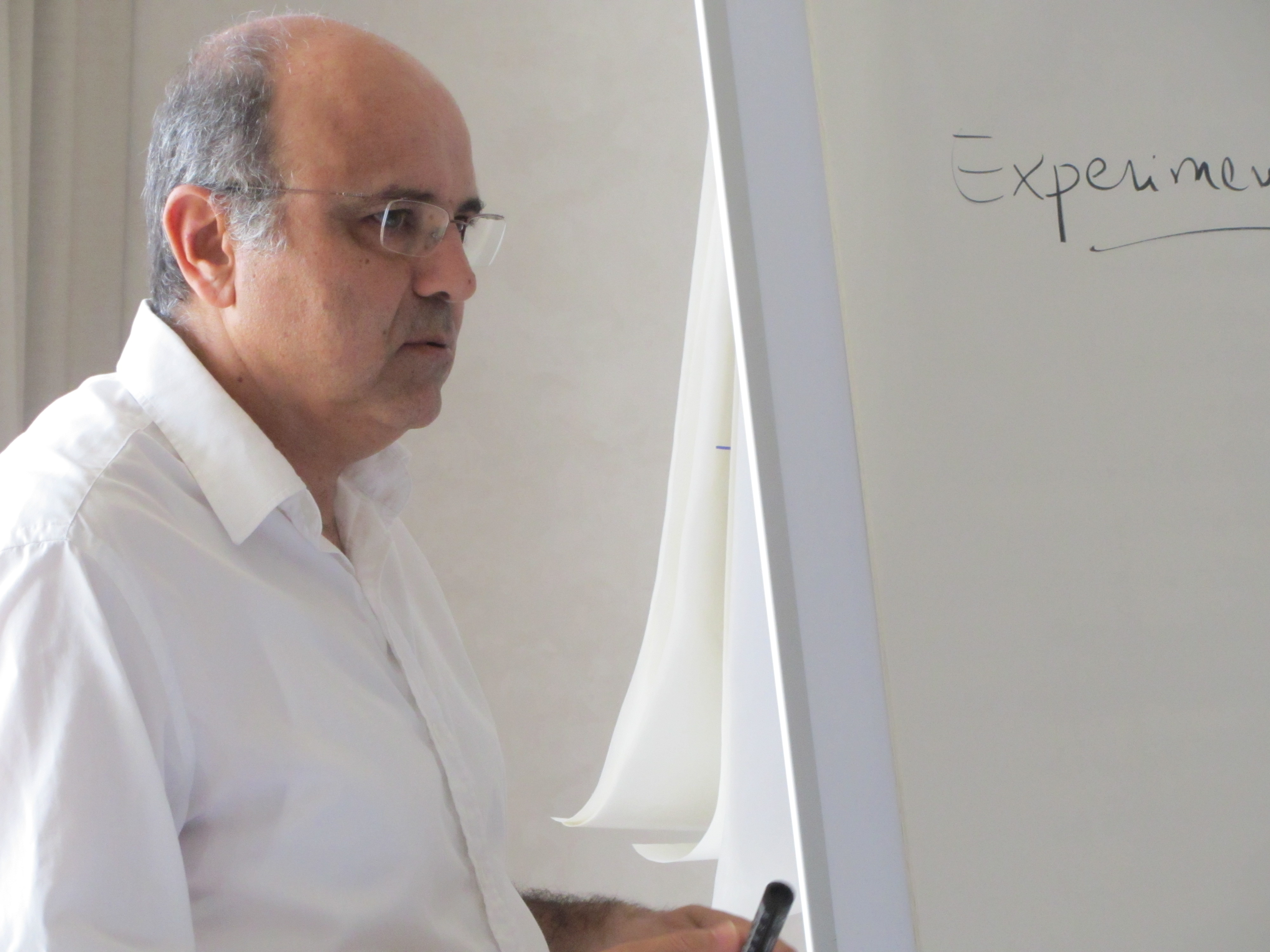 jamel Eddine Henchiri